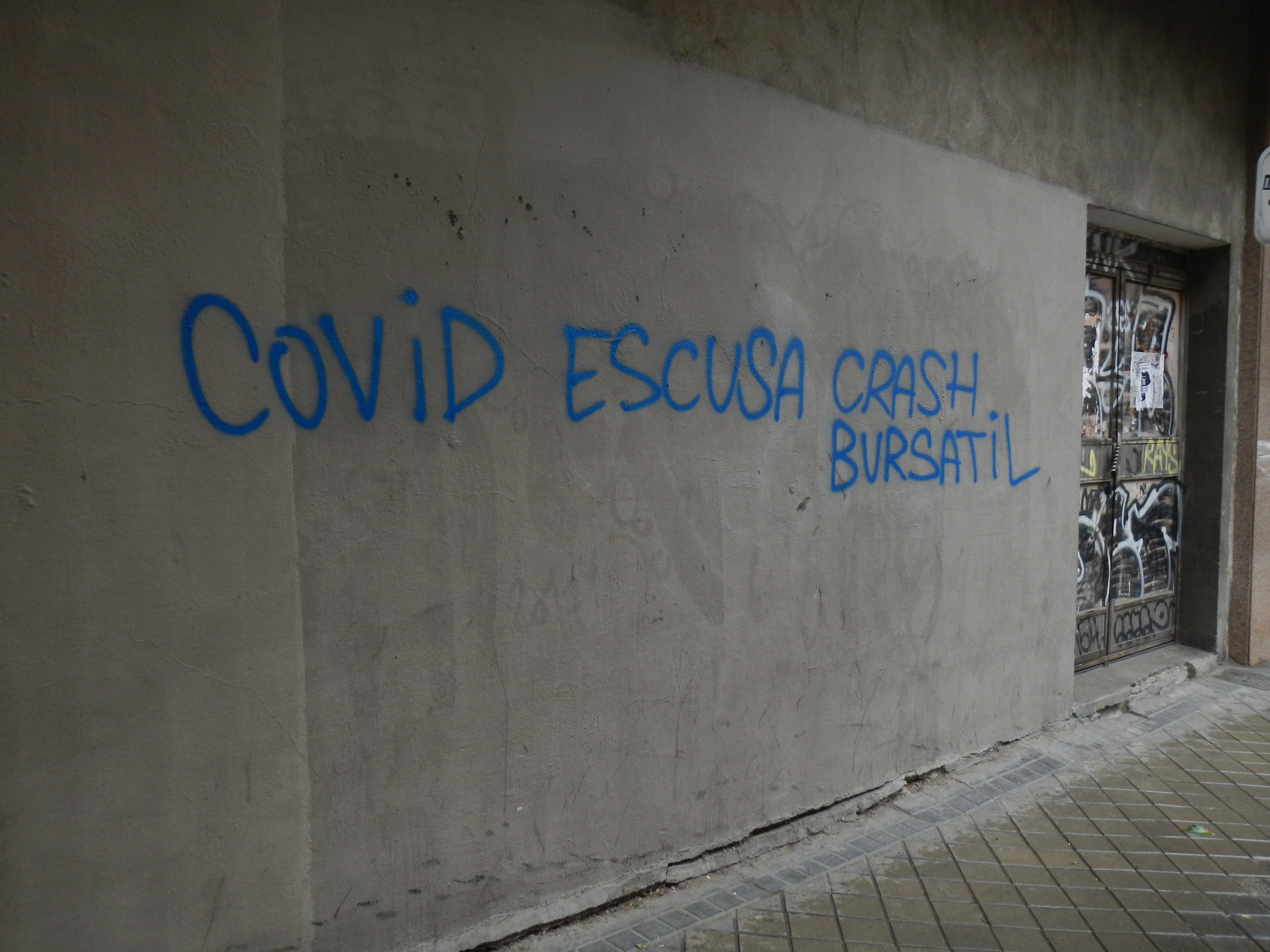 Imágenes sacadas en mi trayecto al trabajo, ó al realizar la compra. Ahora fuerzas, Yo creo en ti. Juntos podemos con todo!! #covid_19 #covid19españa #coronavirusespaña